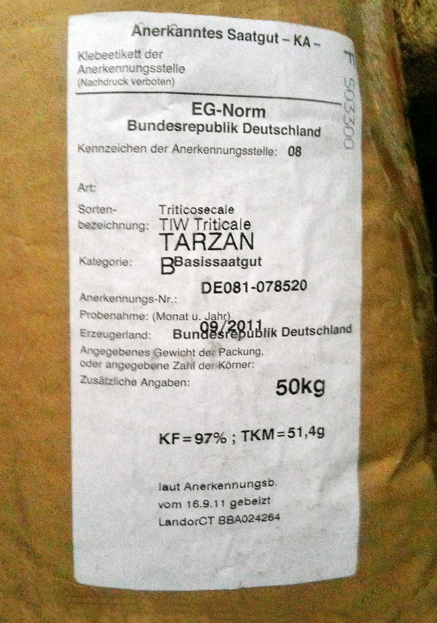 Basissaatgutetikett